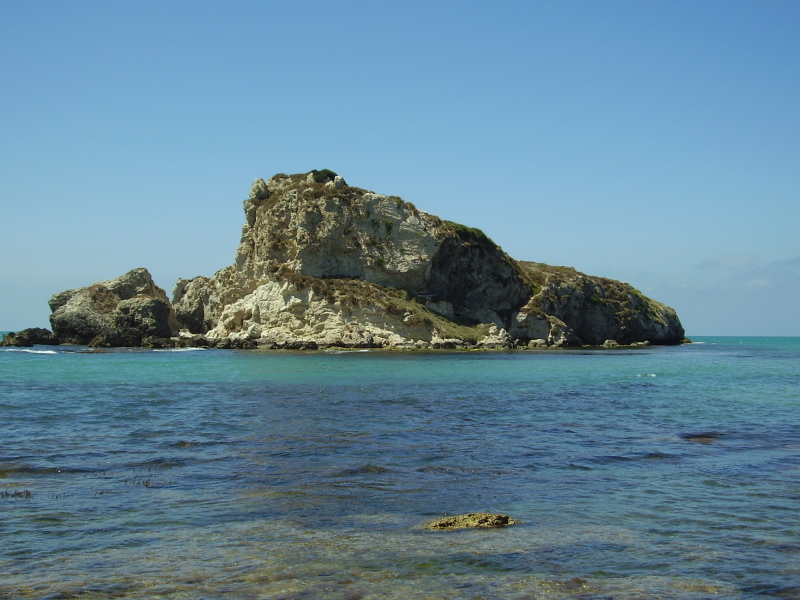 Licata - Spiaggia La Rocca